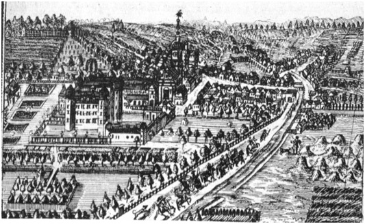 Schlosskulisse Residenz Hohenlohe- Wilhermsdorf